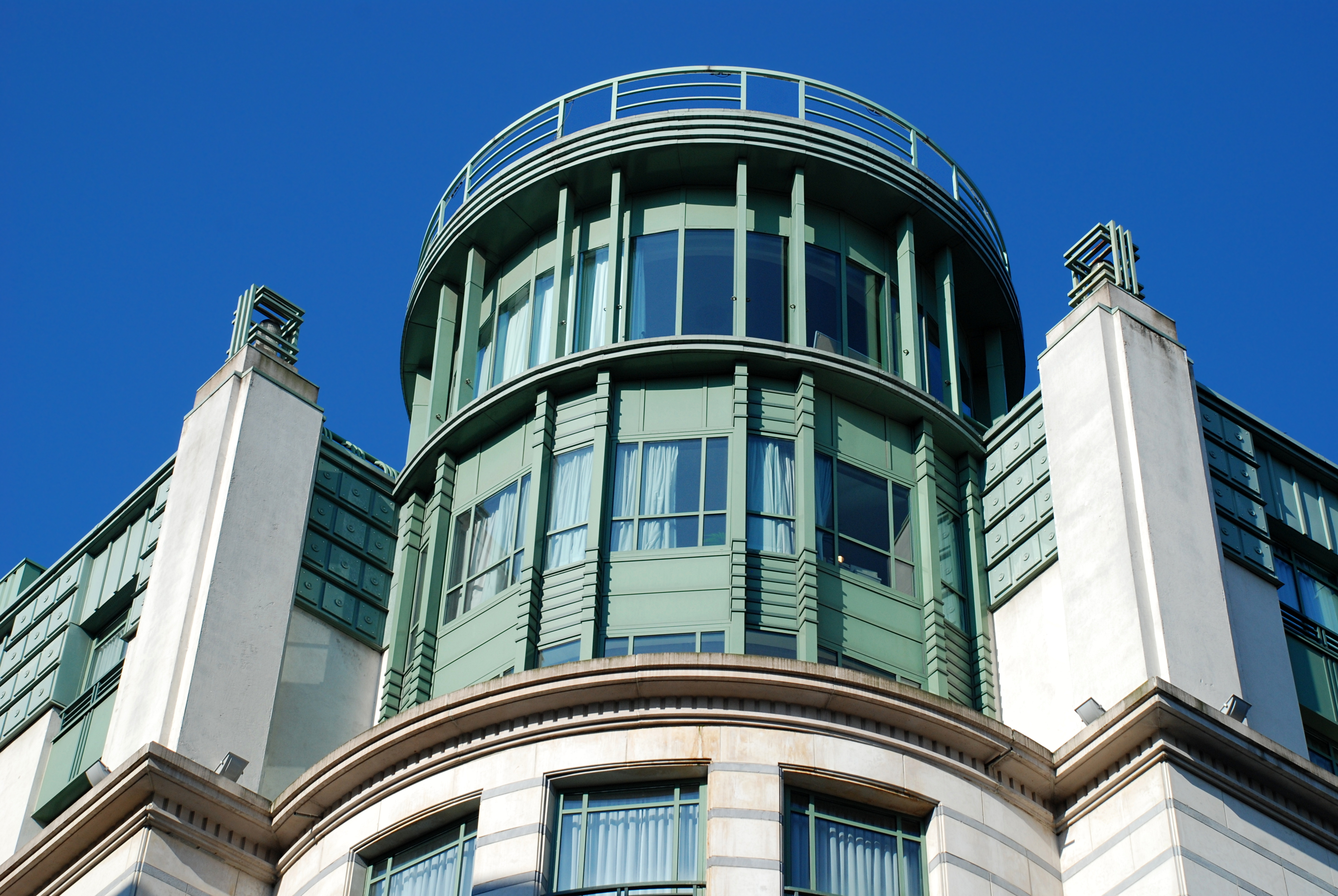 Belgique - Bruxelles - Hôtel Radisson SAS (Architecture postmoderne en Belgique - Atelier d'Art Urbain)